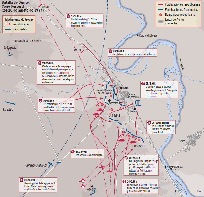 Fragmento de la página 49 del libro "Las Brigadas Internacionales", de Víctor Hurtado y José Luis Martín Ramos (DAU, 2013). el mapa recrea la batalla de Quinto, a orillas del río Ebro, en agosto de 1937.